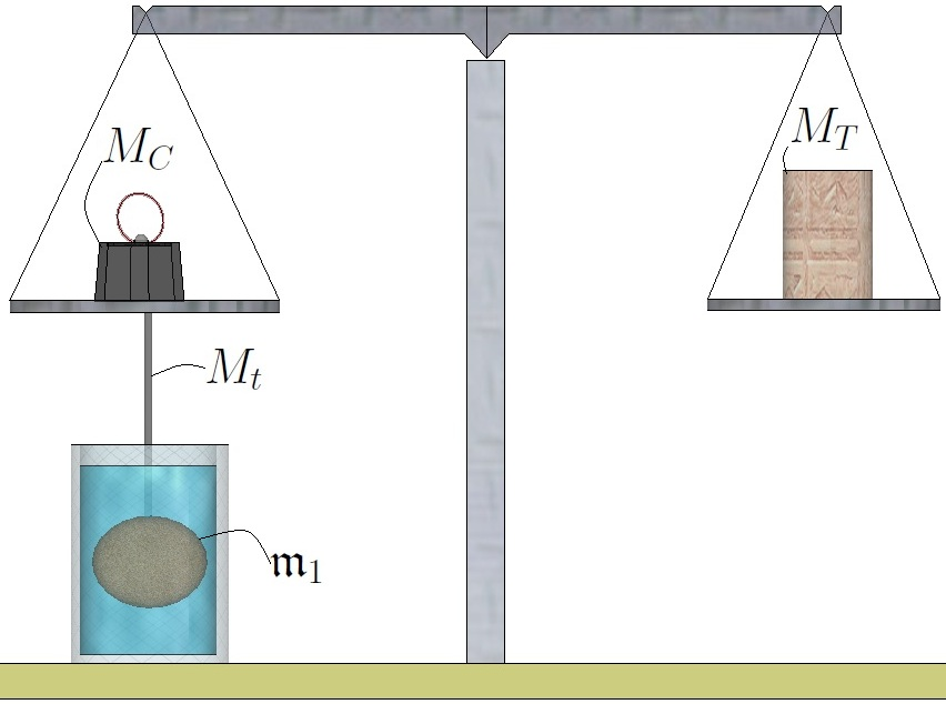 Mesure de la densité relative d'un corps solide (Site " Fascicules de physique. LEZE-LEROND ".)